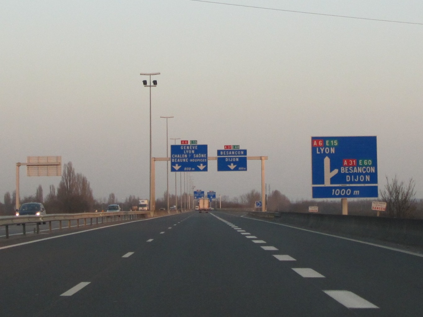 Autoroute A6 - France